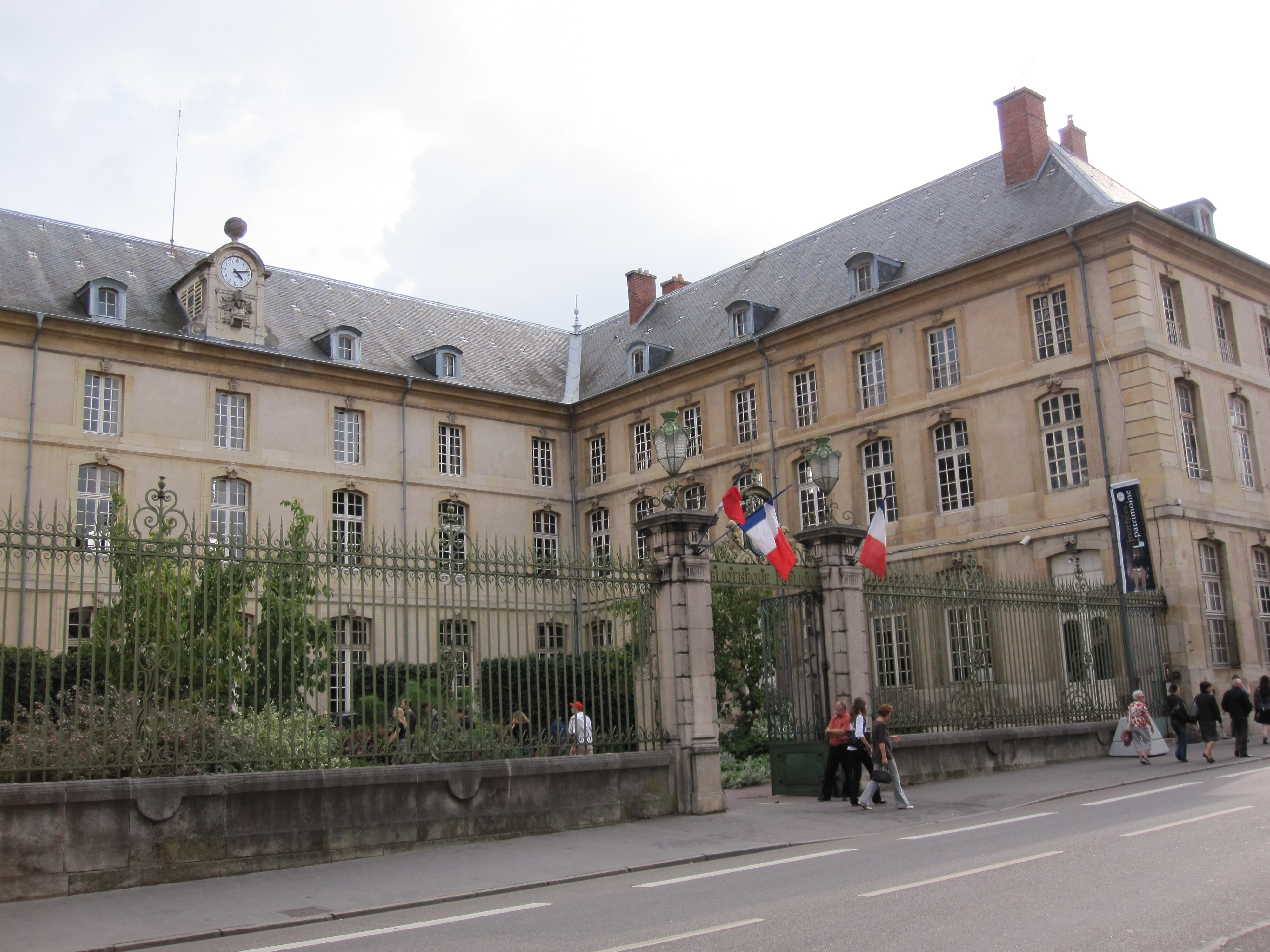 54 Nancy bibliothèque municipale au 43 rue Stanislas